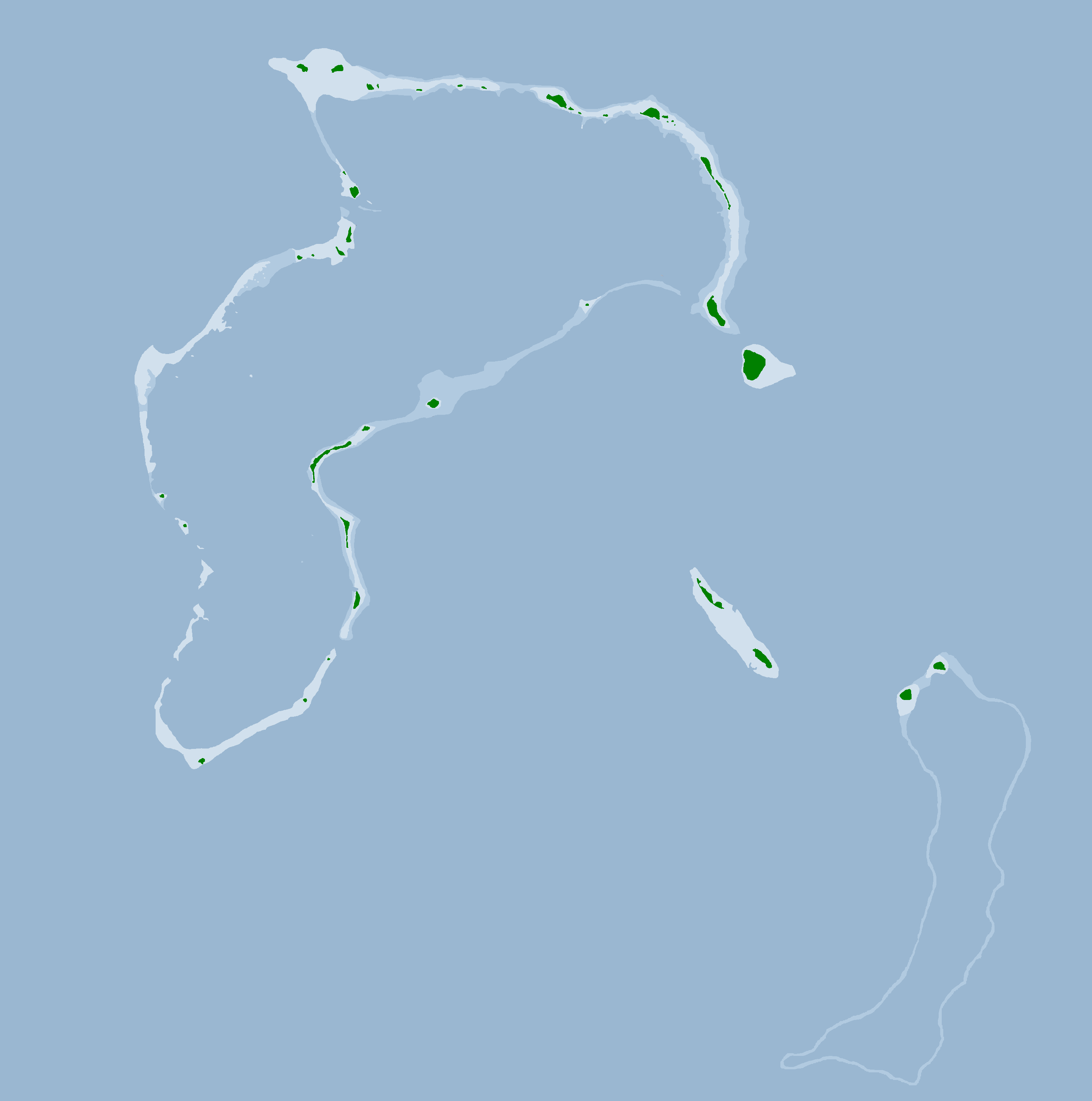 Atolón Ulithi